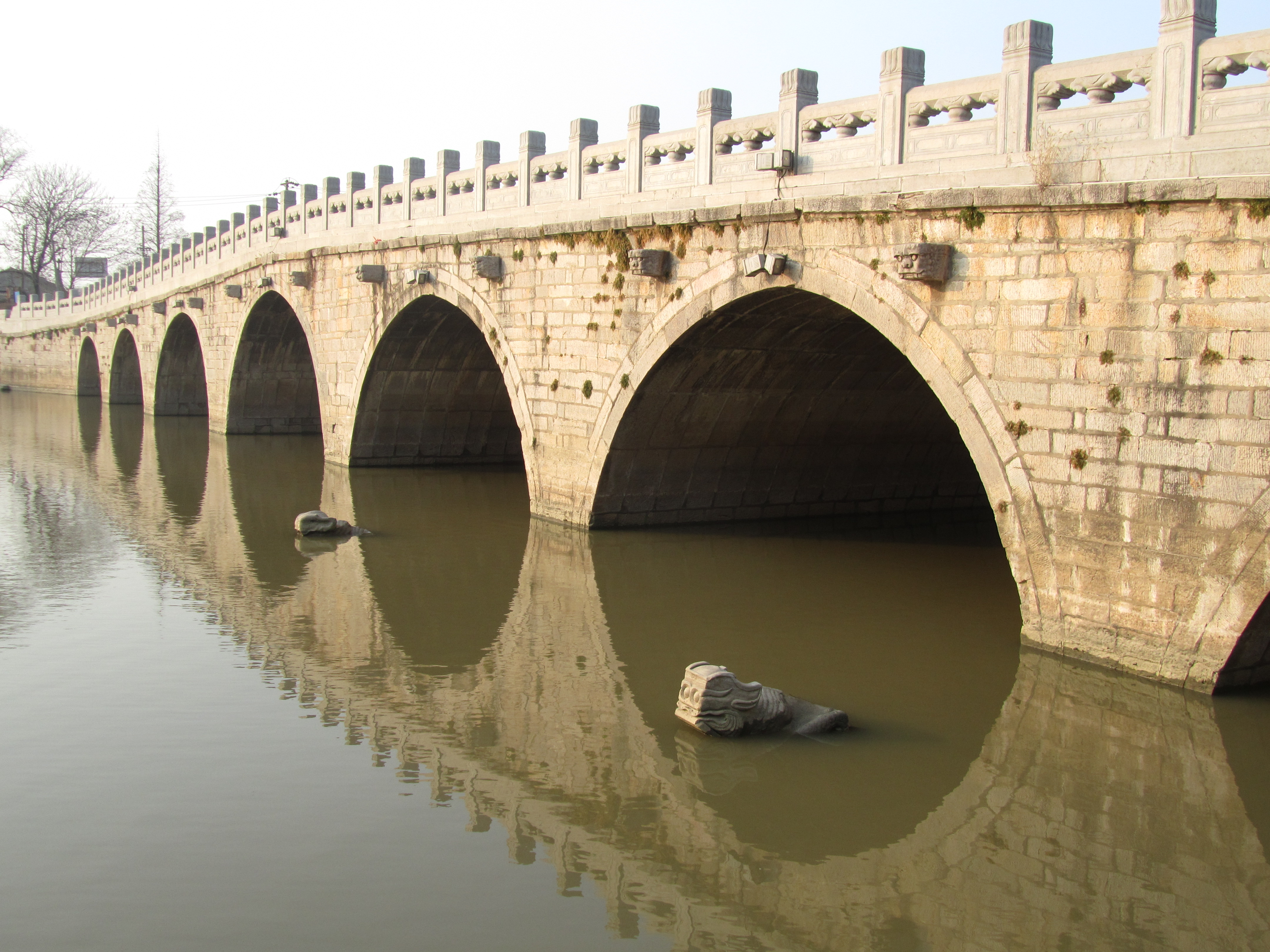 七桥瓮侧面近观。